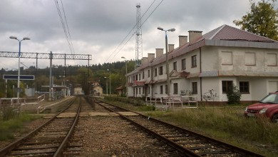 Zwardoń, budynek po byłej siedzibie granicznej placówki kontrolnej Straży Granicznej (SG), od listopada 1995 roku do 24 sierpnia 2005 roku, na stacji kolejowej w Zwardoniu.